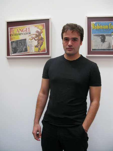 Liberto Rabal en el CBC de Calanda